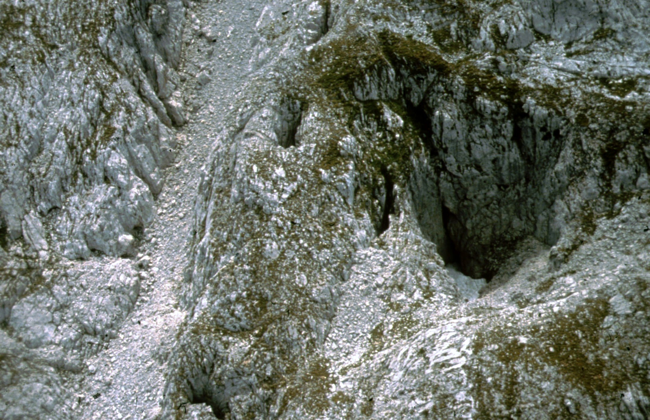 Vue aérienne (depuis un hélicoptère) de l'entrée du gouffre T2 (Sistema del Trave). Cabarales, Picos de Europa, Asturies Espagne. L'entrée du T2 s'ouvre sur le bord (à gauche) de la grande dépression bouchée par un névé.